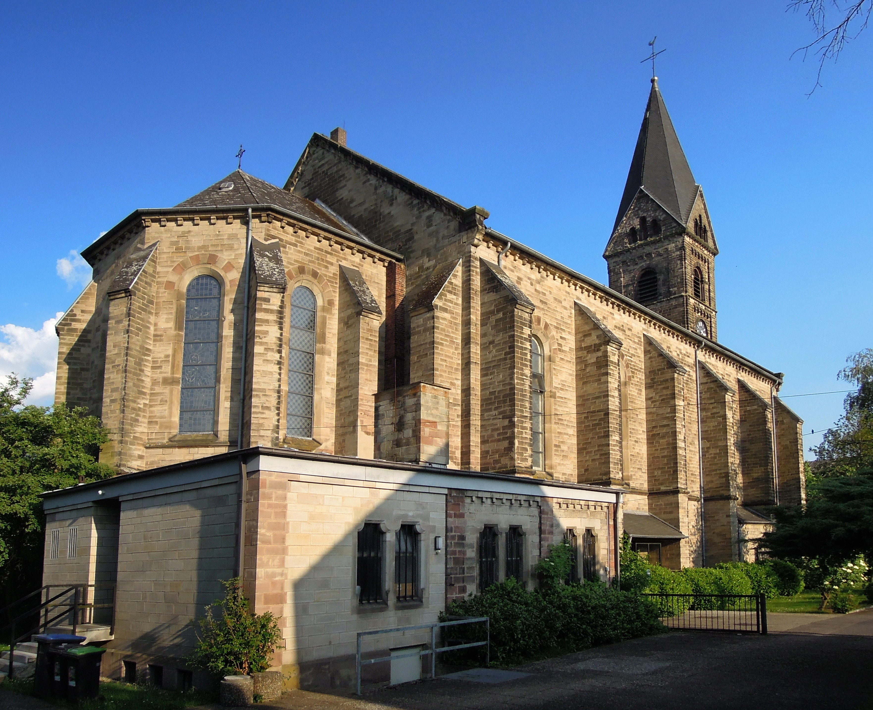 Katholische Pfarrkirche St. Mariae Heimsuchung in Wadgassen